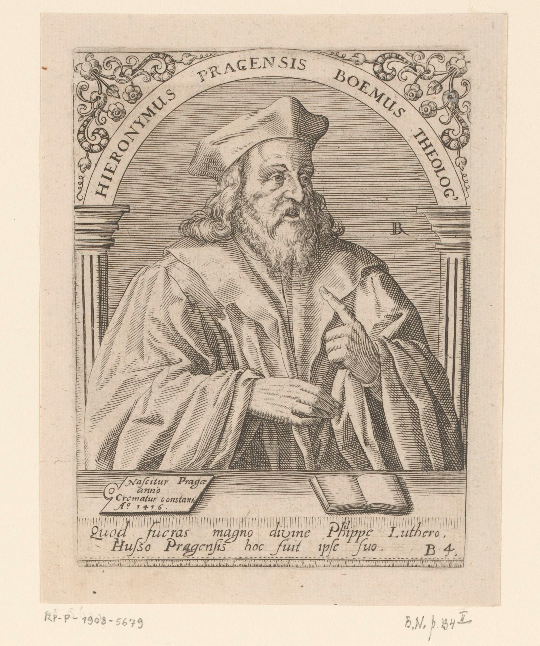 IdentificatieTitel(s): Portret van Portret van Hiëronymus van PraagHieronymus Pragensis Boemus theolog' (titel op object)Serie portretten van vijftiende- en zestiende-eeuwse geleerden (serietitel)Objecttype: prent Objectnummer: RP-P-1908-5679Opschriften / Merken: verzamelaarsmerk, verso, gestempeld: Lugt 2228Omschrijving: Rechtsonder genummerd B4.VervaardigingVervaardiger: prentmaker: Robert Boissard (vermeld op object)prentmaker: Johann Theodor de Bry (verworpen toeschrijving)Plaats vervaardiging: FrankrijkDatering: 1597 - 1599Materiaal: papier Techniek: graveren (drukprocedé)Afmetingen: plaatrand: h 138 mm × b 105 mmToelichtingMogelijk prent uit: Boissard, Jean-Jacques; Bry, Theodoor de; e.a. Bibliotheca sive thesaurus virtutis et gloriae in quo continentur illustrium eruditione et doctrina virorum effigies et vitae (...). Frankfurt: Guilielmi Fitzeri, 1628.OnderwerpWat: historical personsbookWie: Hiëronymus van PraagVerwerving en rechtenVerwerving: aankoop 1905Copyright: Publiek domein